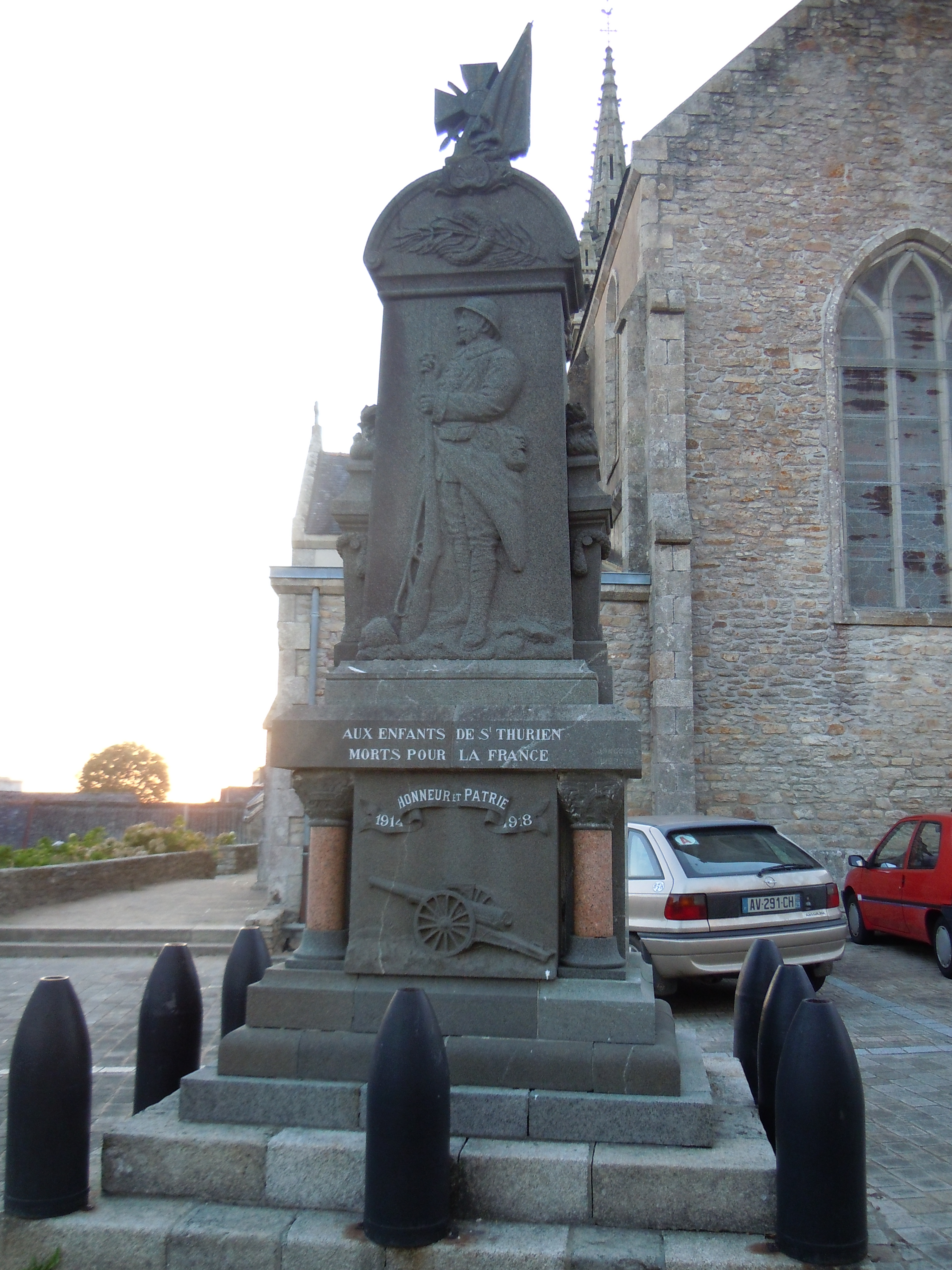 le monument aux morts de Saint-Thurien (département du Finistère)